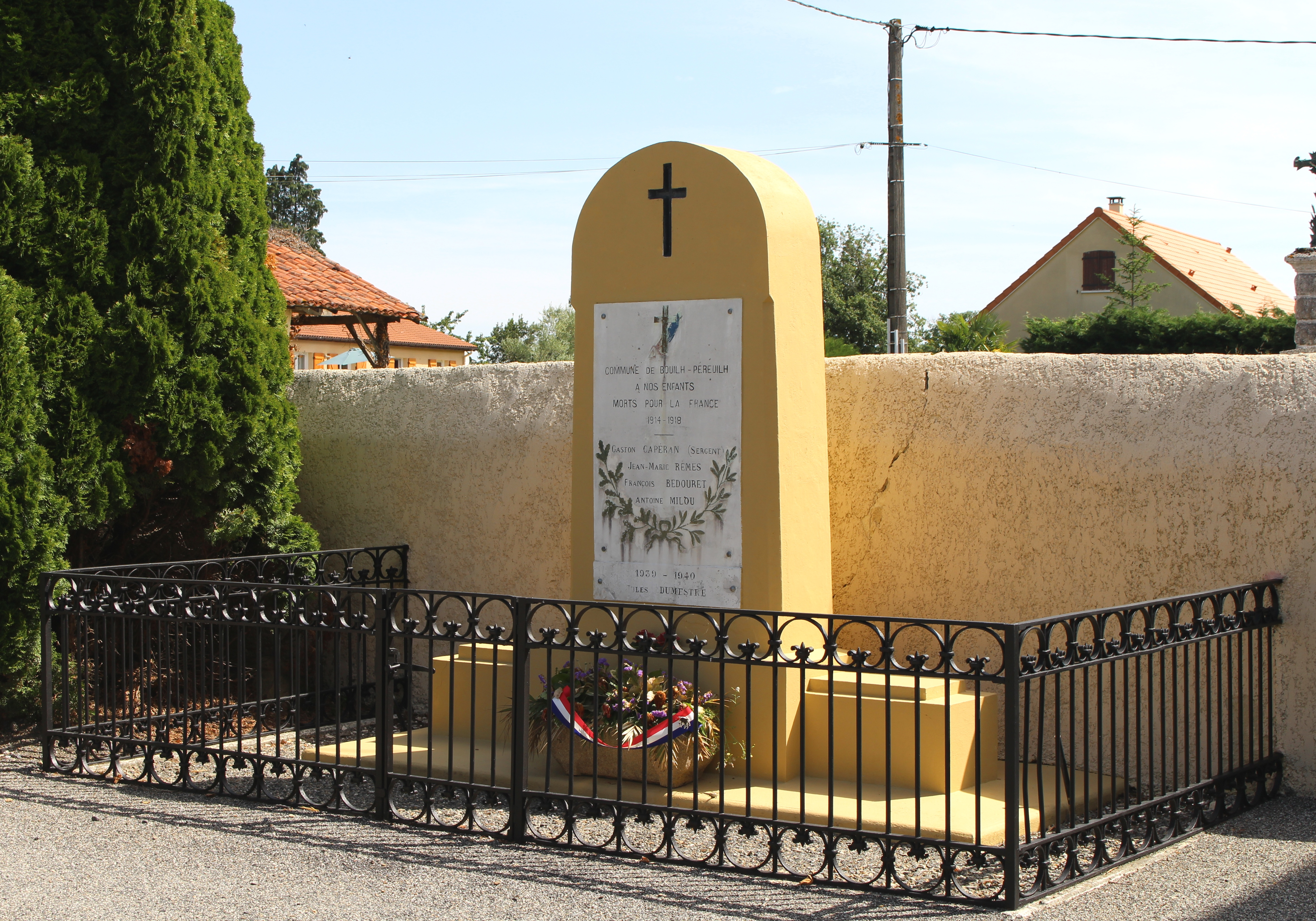 Monument aux morts de Bouilh-Péreuilh (Hautes-Pyrénées)